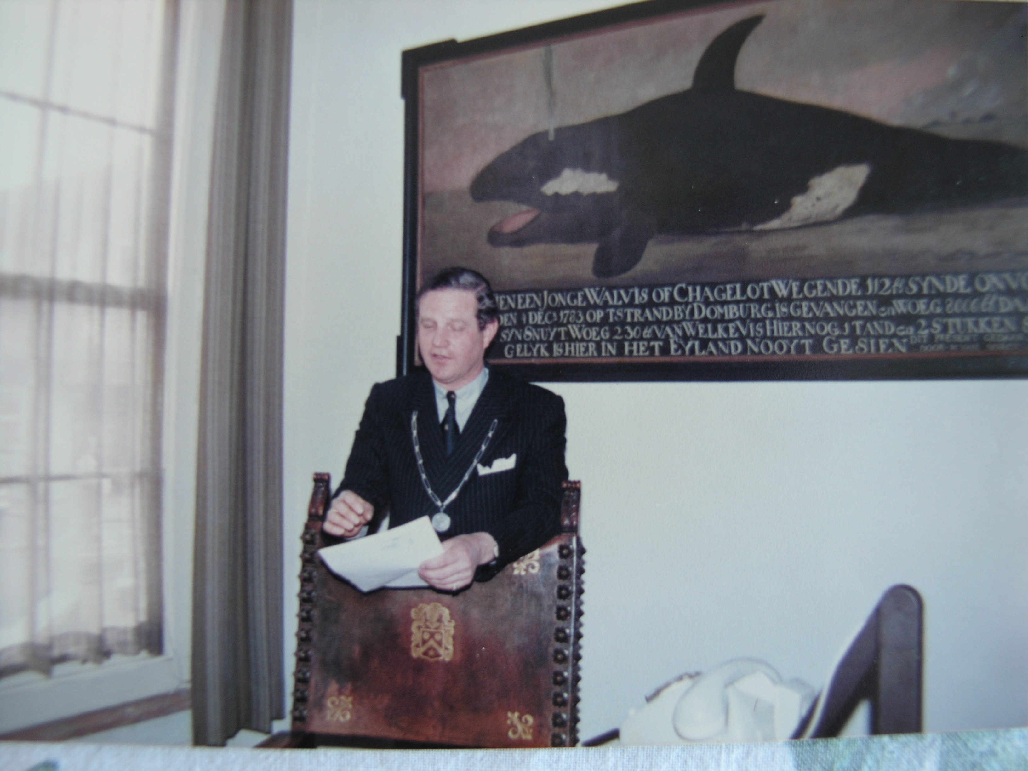 Een burgemeester van Domburg met Walvis